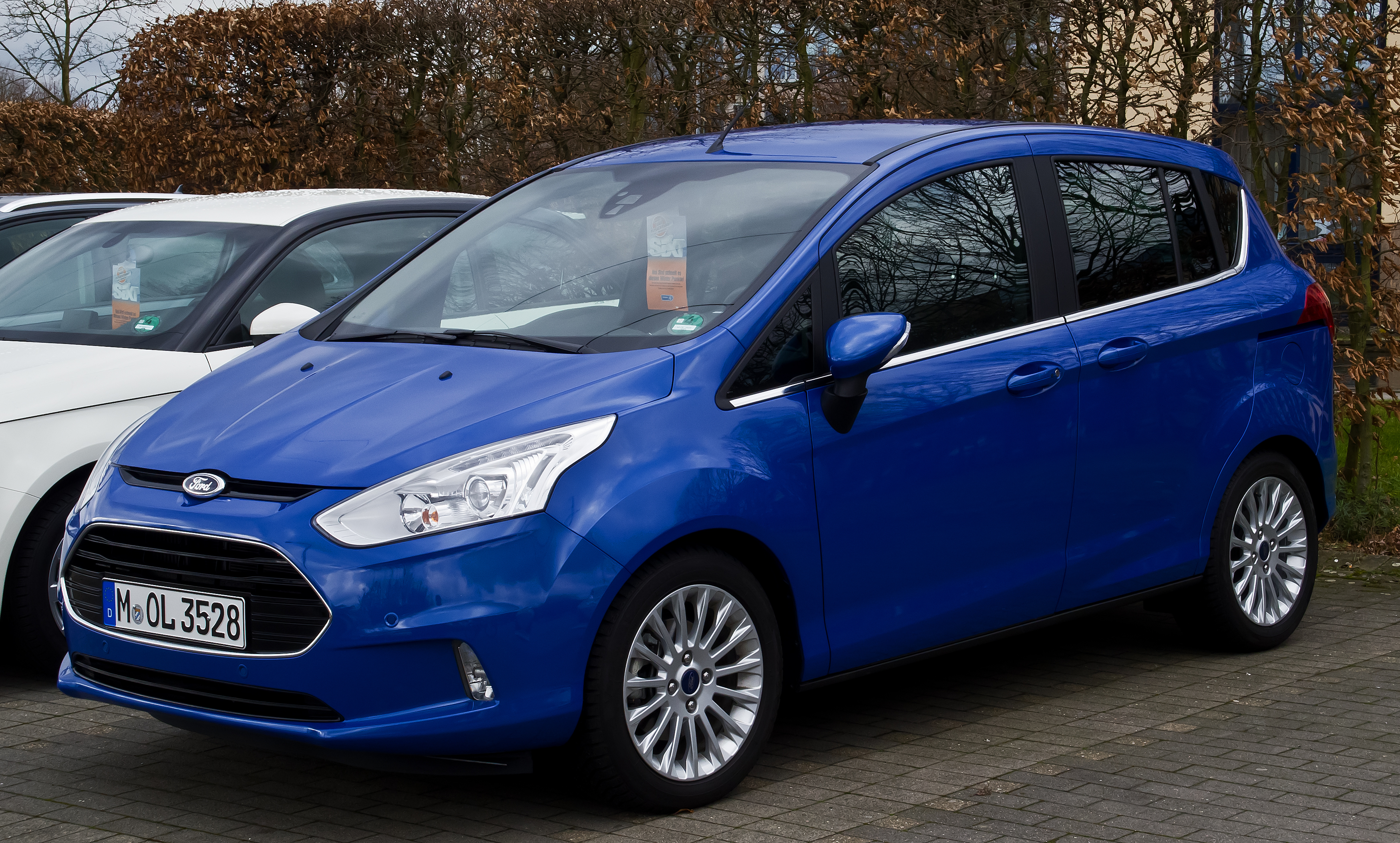 Ford B-Max Titanium